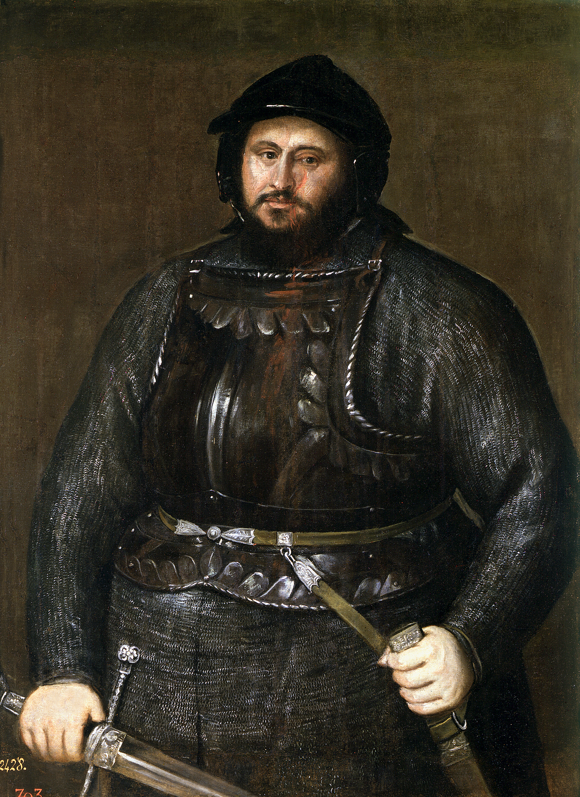 Retrato de Juan Federico I de Sajonia (1503-1554), duque y elector de Sajonia. El duque aparece como prisionero, armado y sangrando por una herida que recibió en la mejilla en la batalla de Mühlberg, donde fue derrotado por las tropas del emperador Carlos I de España.